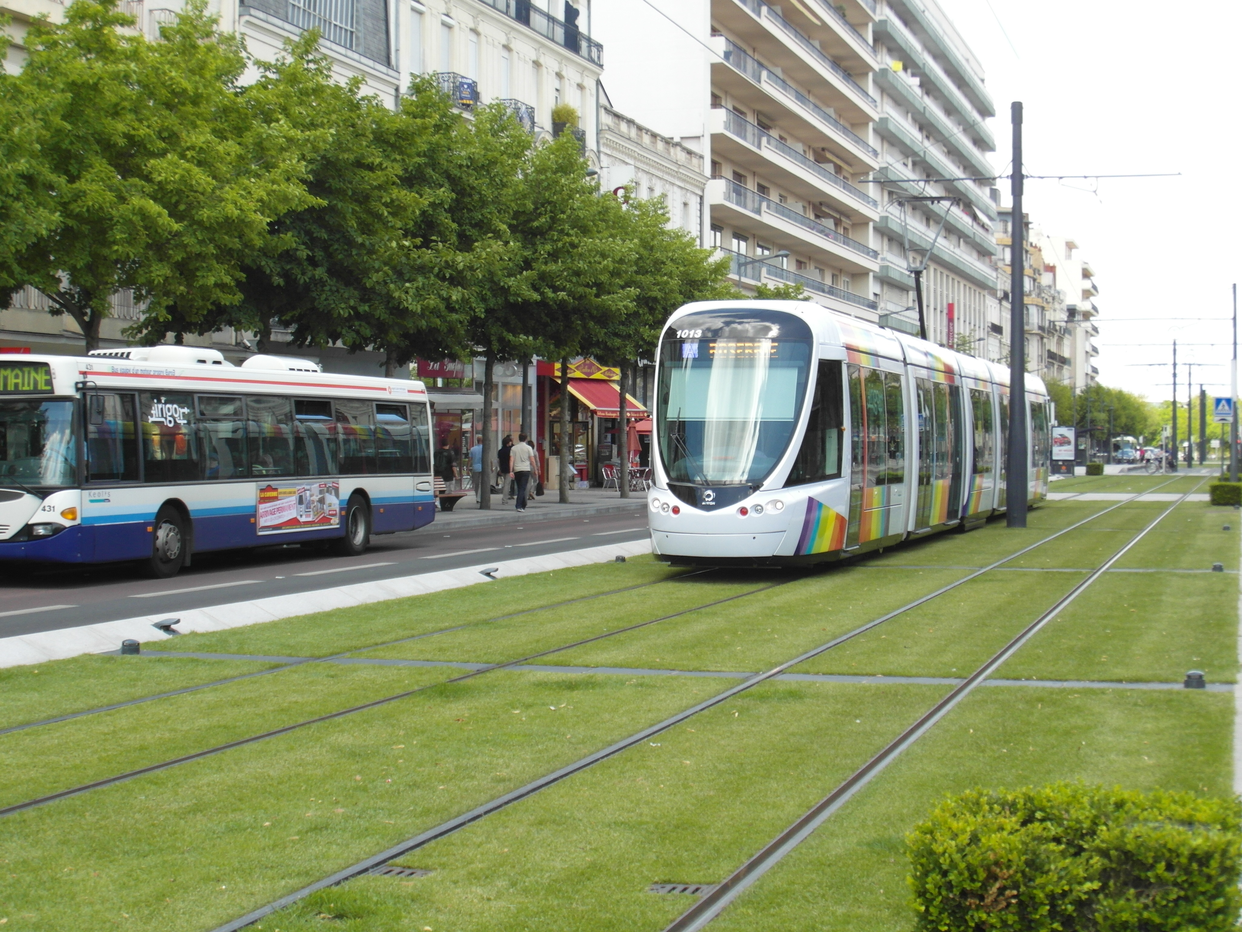 Straßenbahn Angers - Städtebauliche Integration im Bereich Gares (Bahnhöfe), Boulevard du Maréchal Foch und Rue d'Alsace